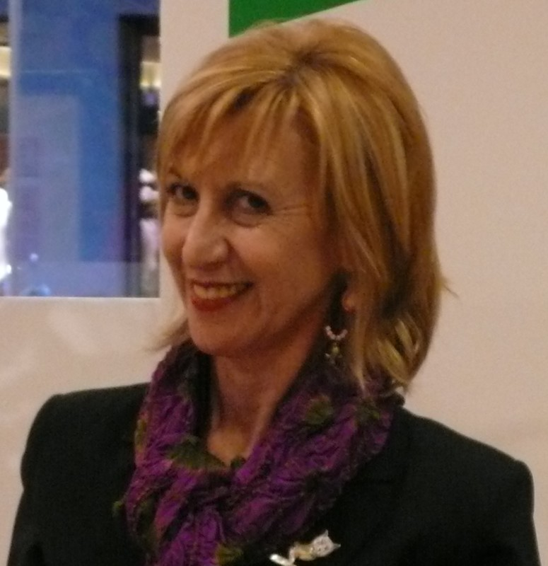 Rosa Díez en Madrid (10/04/2008)